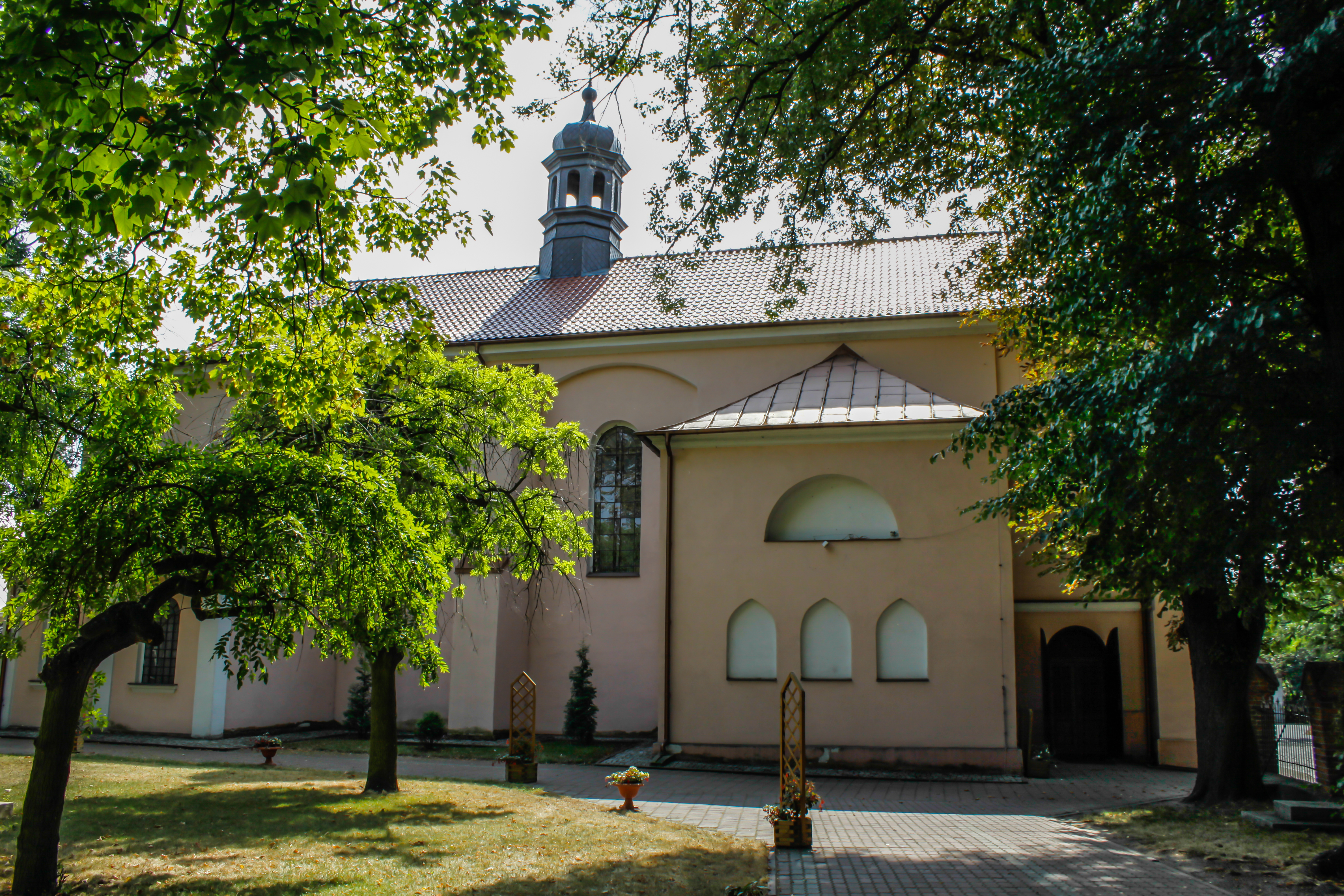 Dobrzyń nad Wisłą, kościół klasztorny franciszkanów, ob. par. p.w. Wniebowzięcia NMP, XV